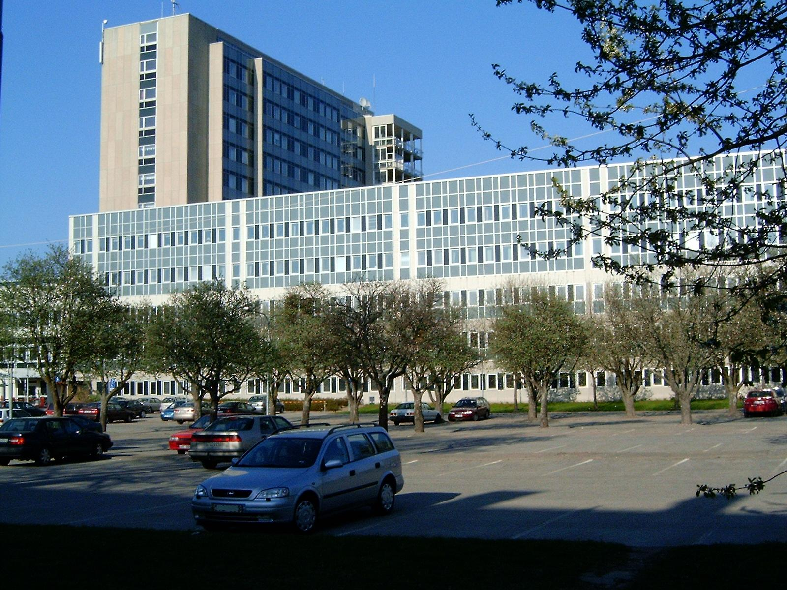 Sjukhuset i Västerås.